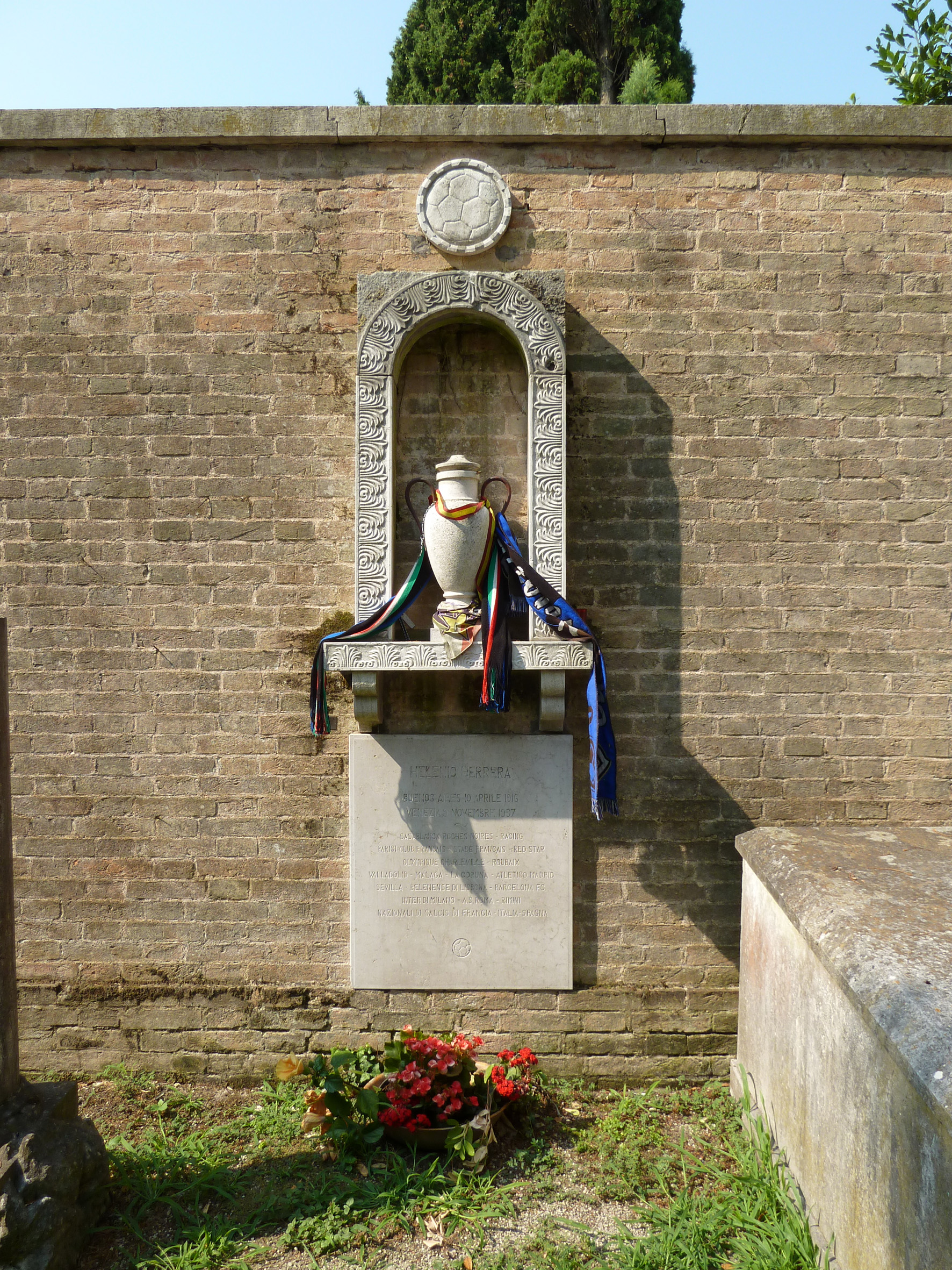 Sepultura de Helenio Herrera (1910-1997) en el cementerio de San Michele (Venecia). Su tumba está situada junto al muro sur del recinto evangelico.